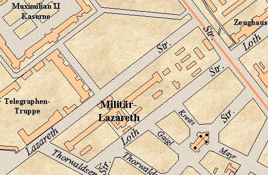 Lageskizze des Militärlazaretts in München um 1922